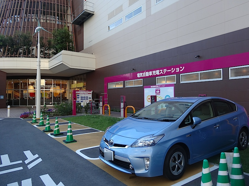 200V普通充電設備 イオンモール伊丹昆陽「電気自動車充電ステーション」 （兵庫県伊丹市、2012年8月2日撮影）